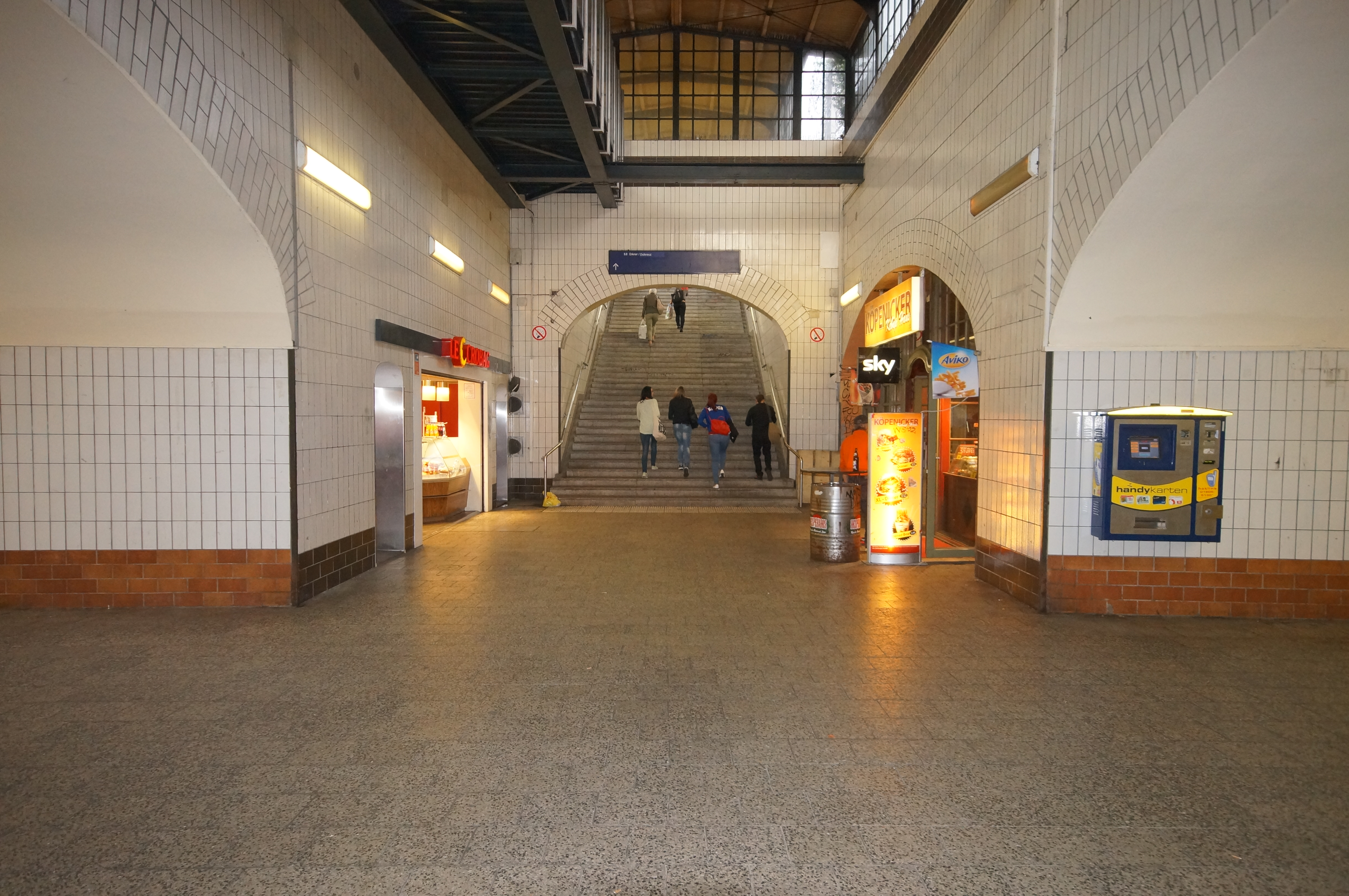 Die Haupthalle des Bahnhofs Berlin-Köpenick